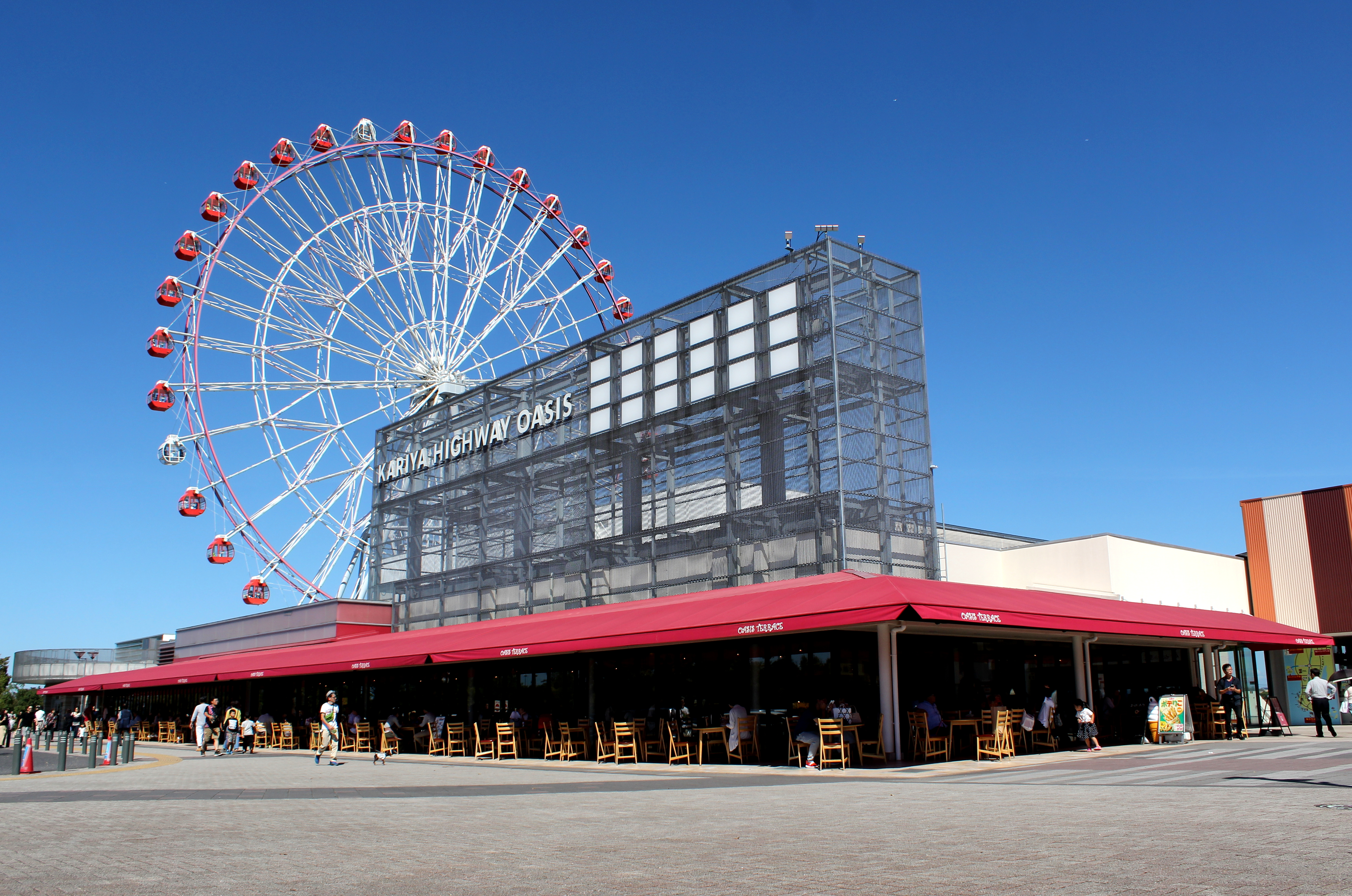 刈谷ハイウェイオアシス セントラルプラザ